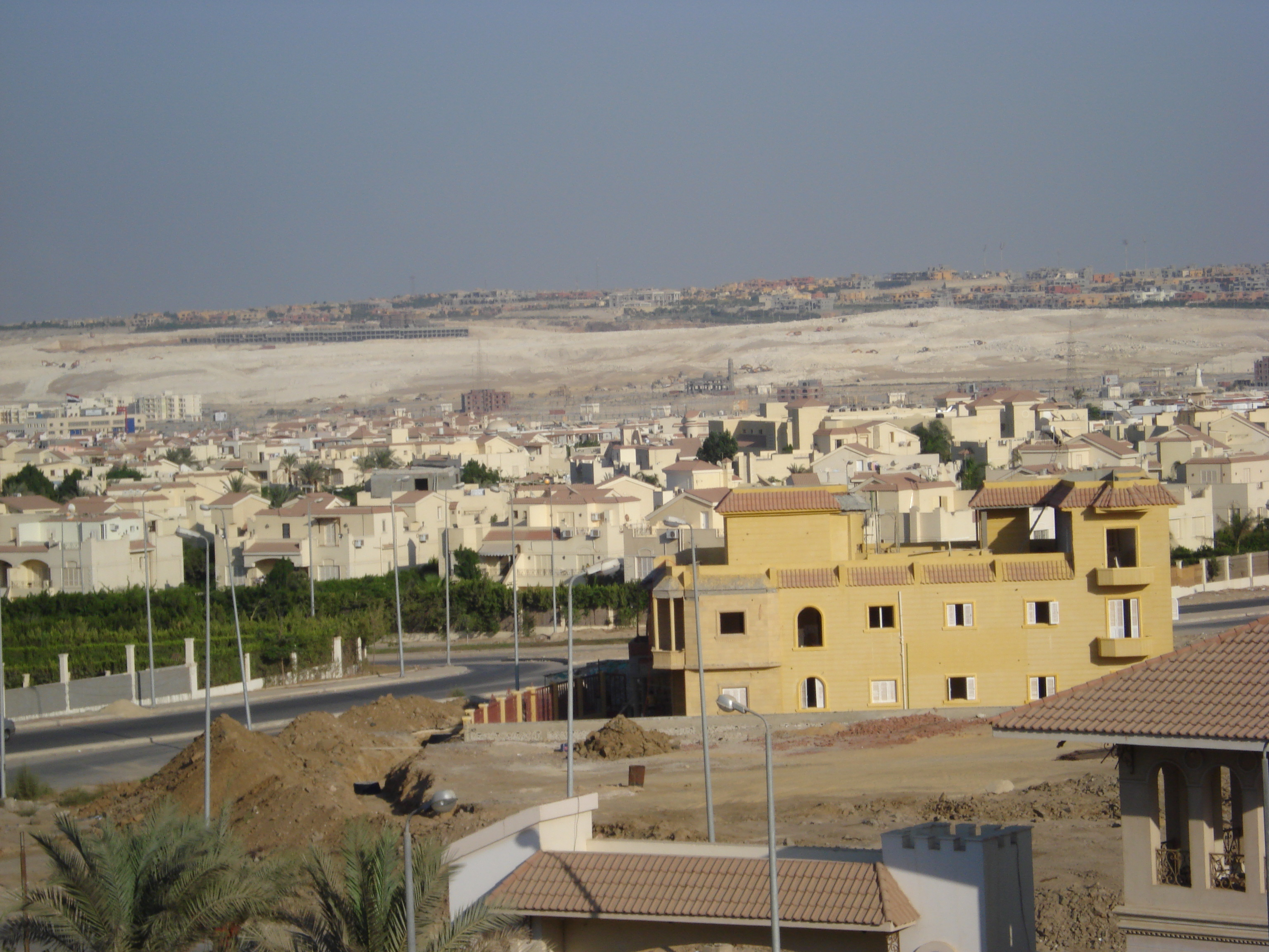 مدينة الشيخ زايد - يظهر في الصورة مجمعات الكرمة وزايد 2000 كما يظهر مجمع بالم هيلز امام مدينة الشيخ زايد.